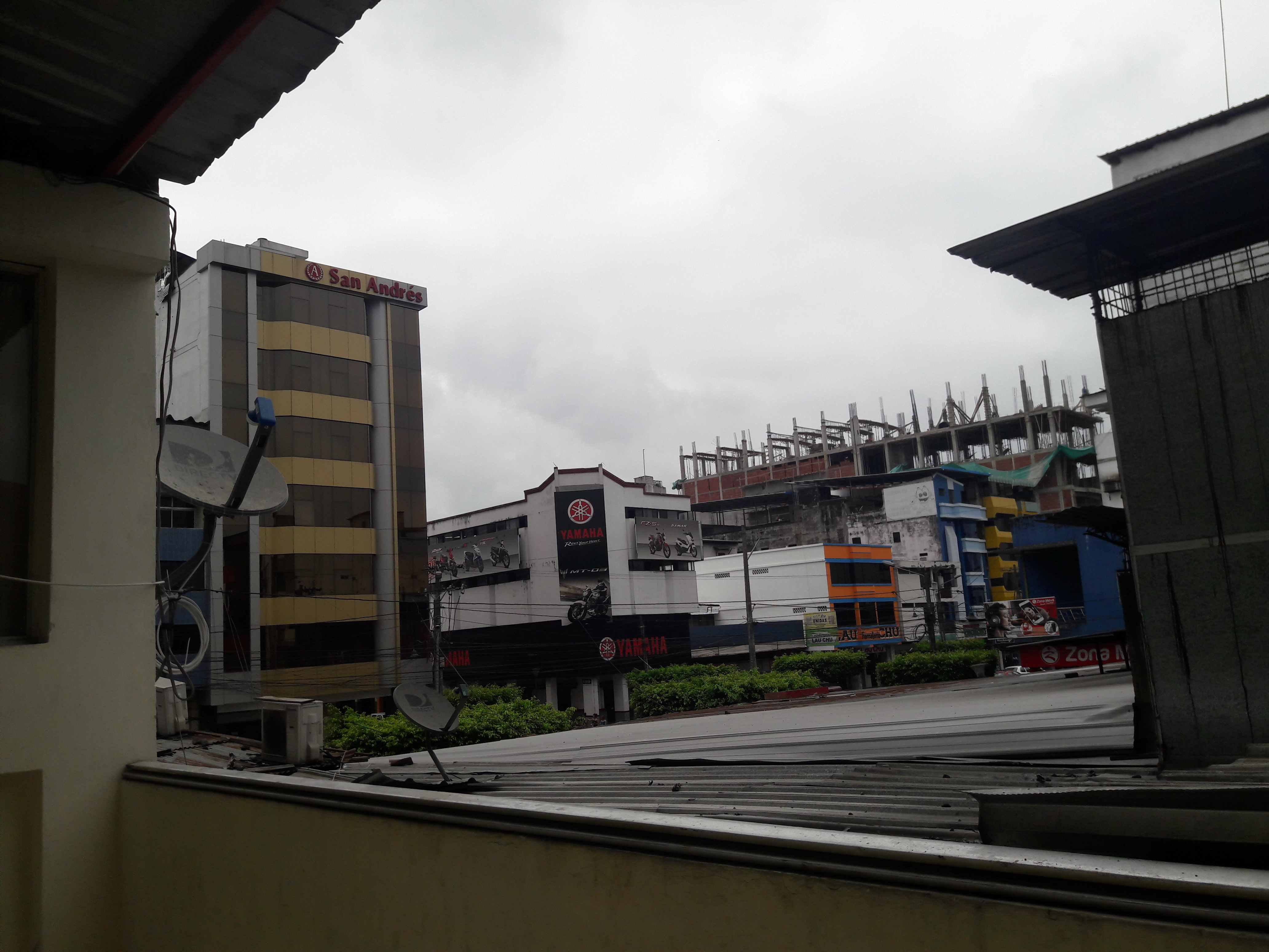 Vista del centro de Quevedo con la construccion de un edificio al fondo.